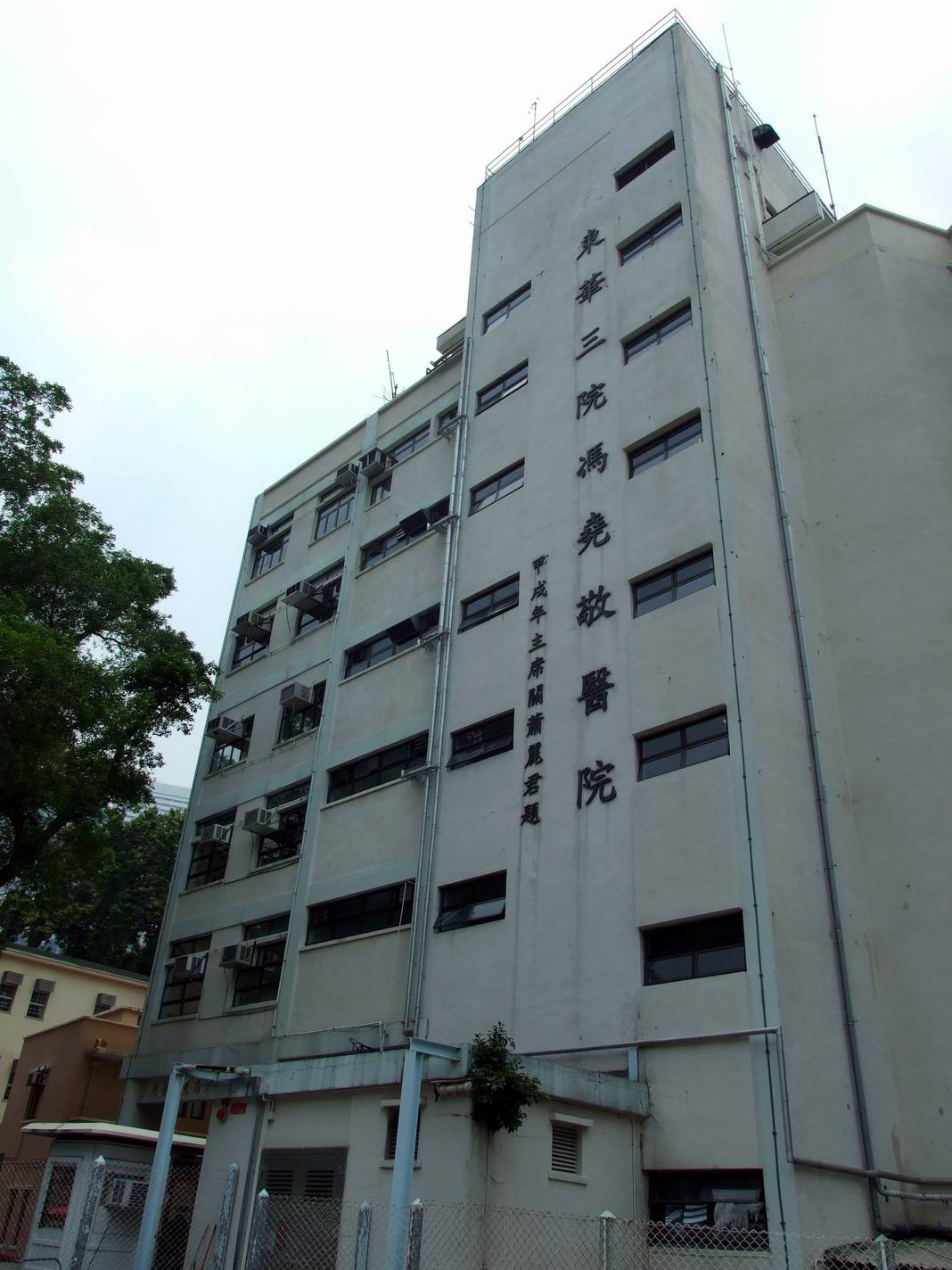 東華三院馮堯敬醫院